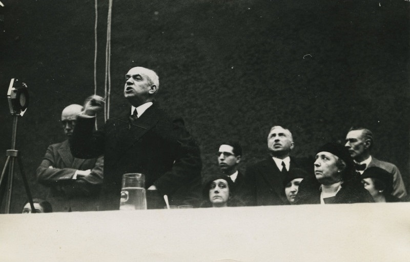 Discurso del diputado tradicionalista Joaquín Beunza durante un mitin en el frontón Euskalduna de Bilbao.